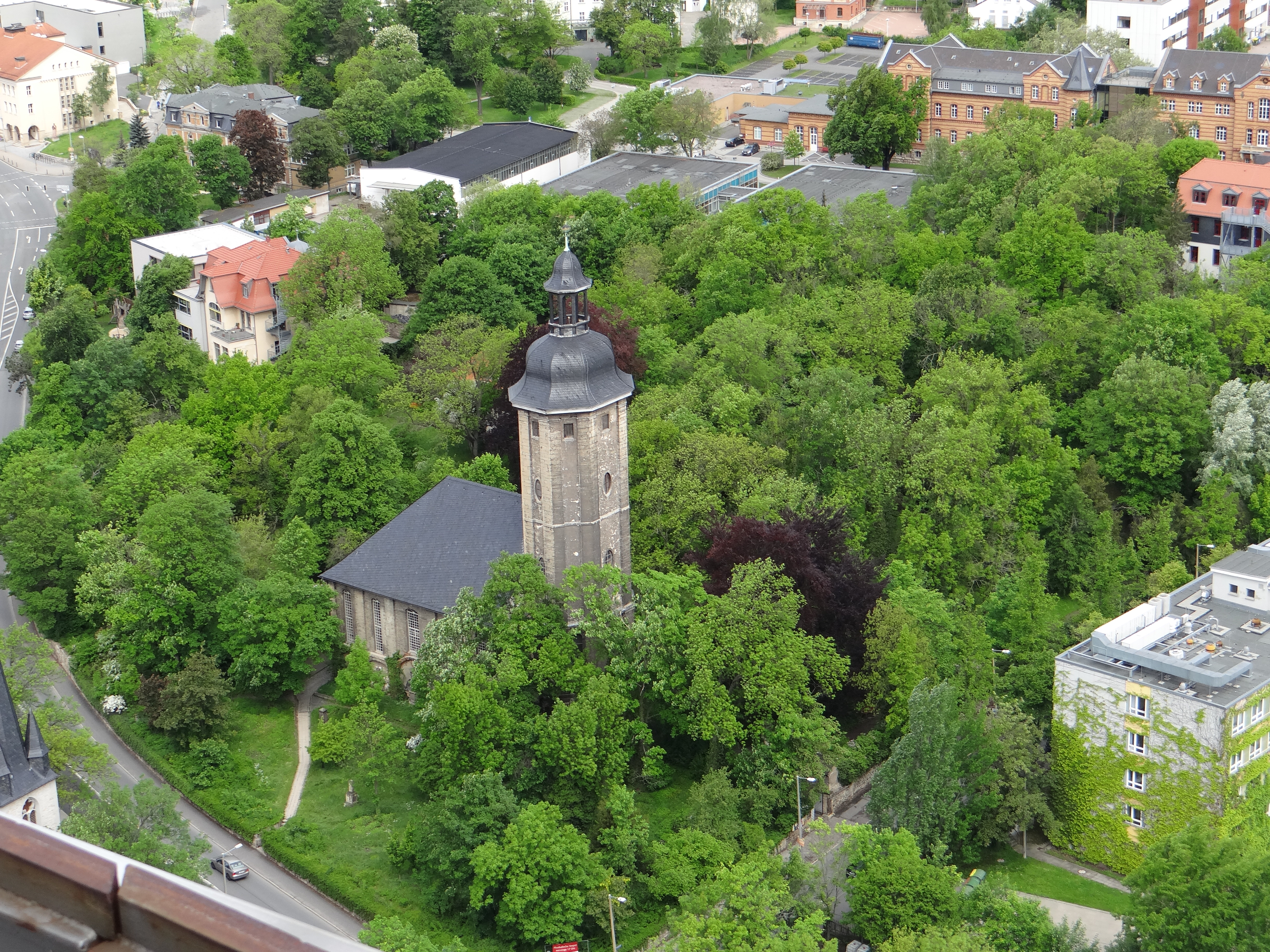 Philosophenweg 1, aufgenommen vom Jentower